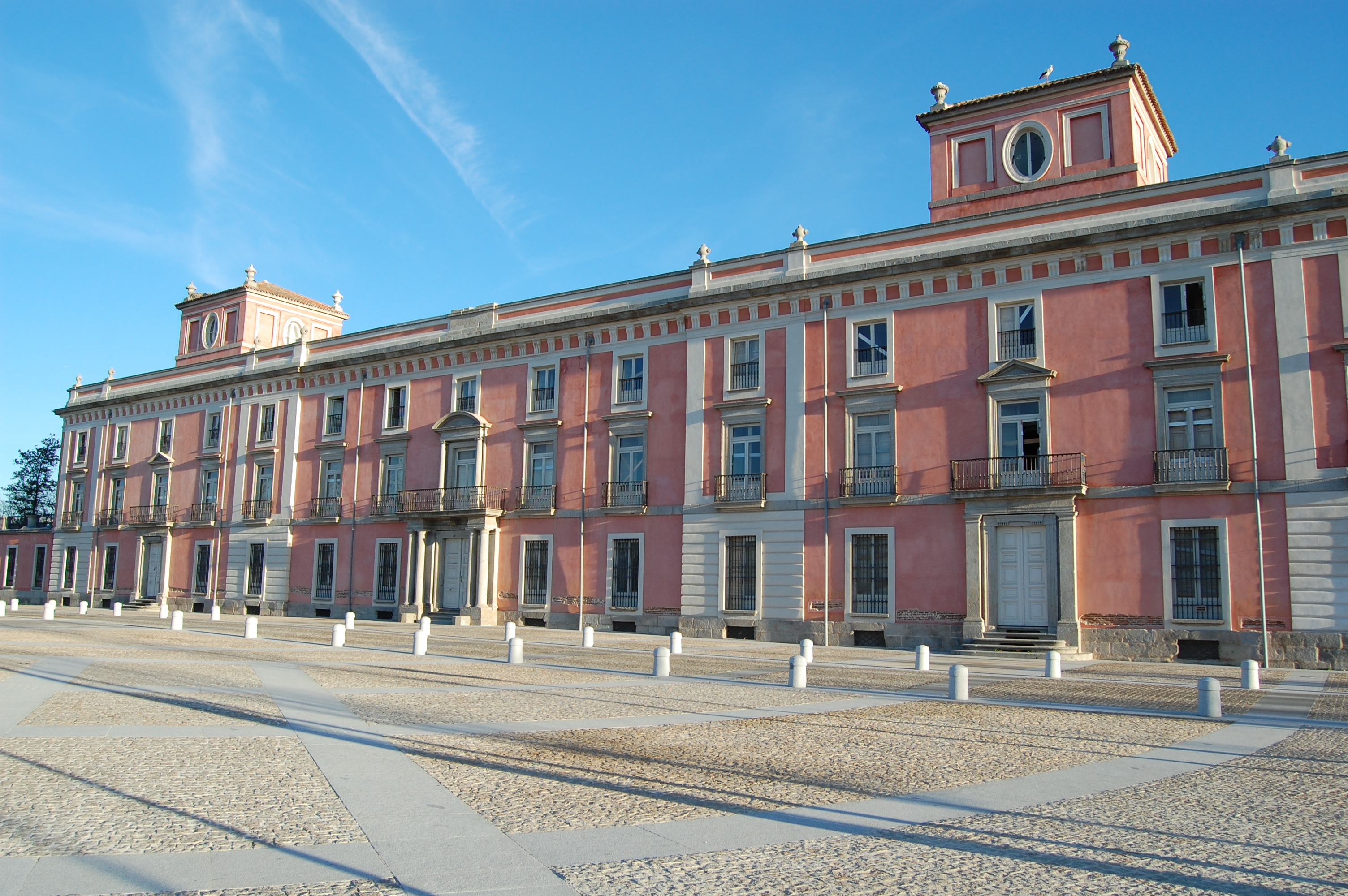 Palacio del infante don Luis en Boadilla del Monte (Madrid, España), obra de Ventura Rodríguez.